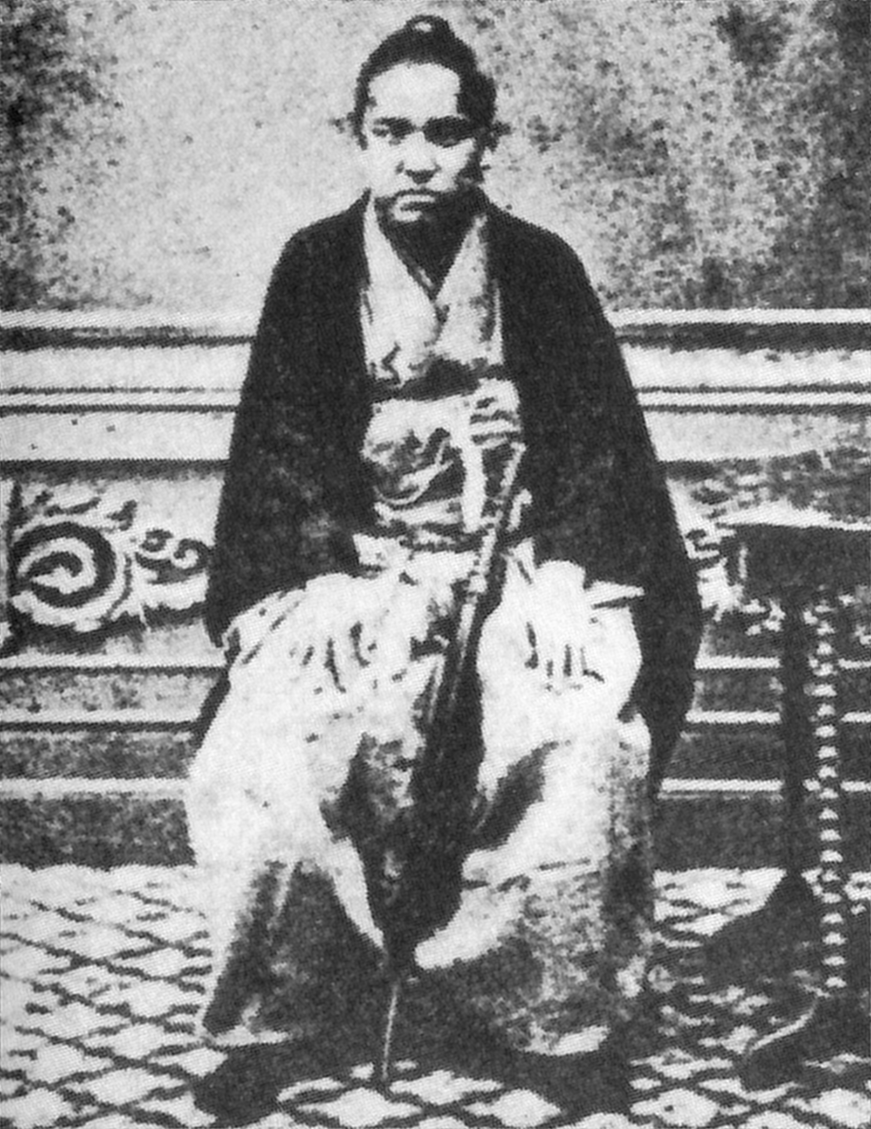 生駒親敬の肖像写真。